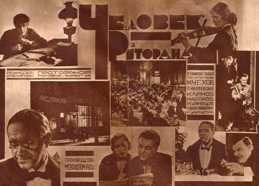 Постер фильма "Человек из ресторана". СССР. 1927